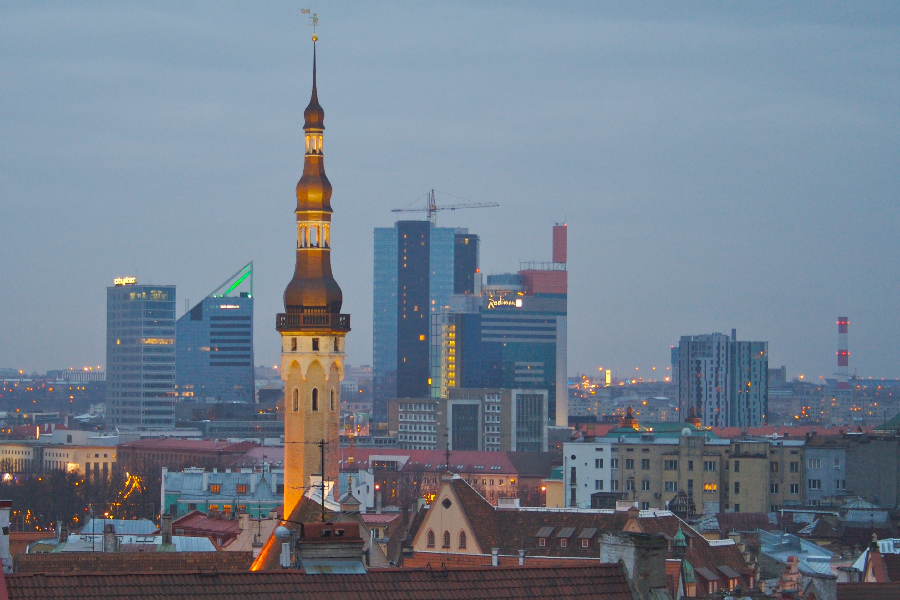 Tallinn, Estonia.